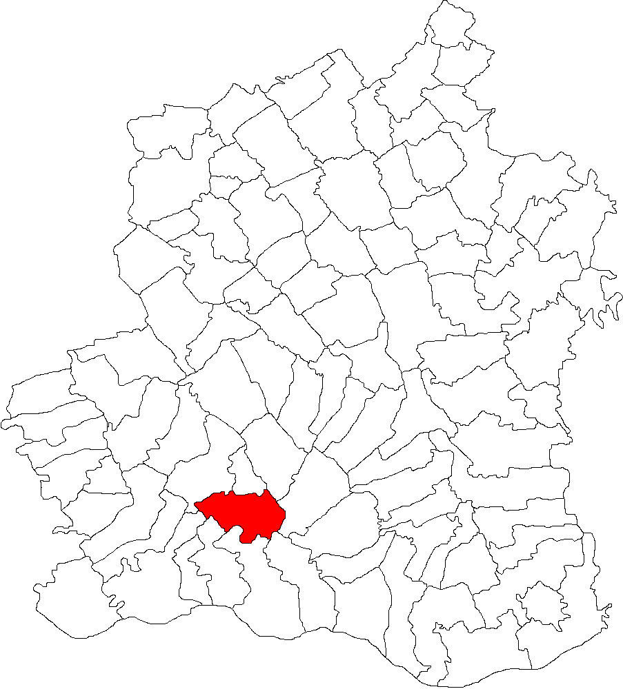 Categorie:Hărţi ale judeţului Teleorman